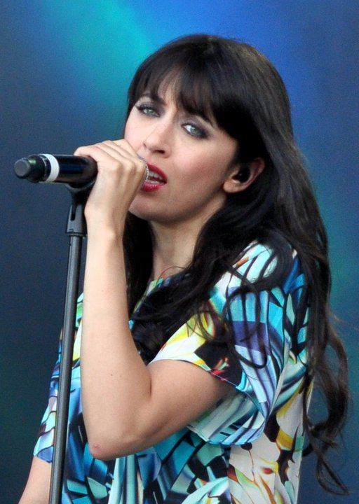 Nolwenn Leroy au concert pour l'égalité de SOS-Racisme